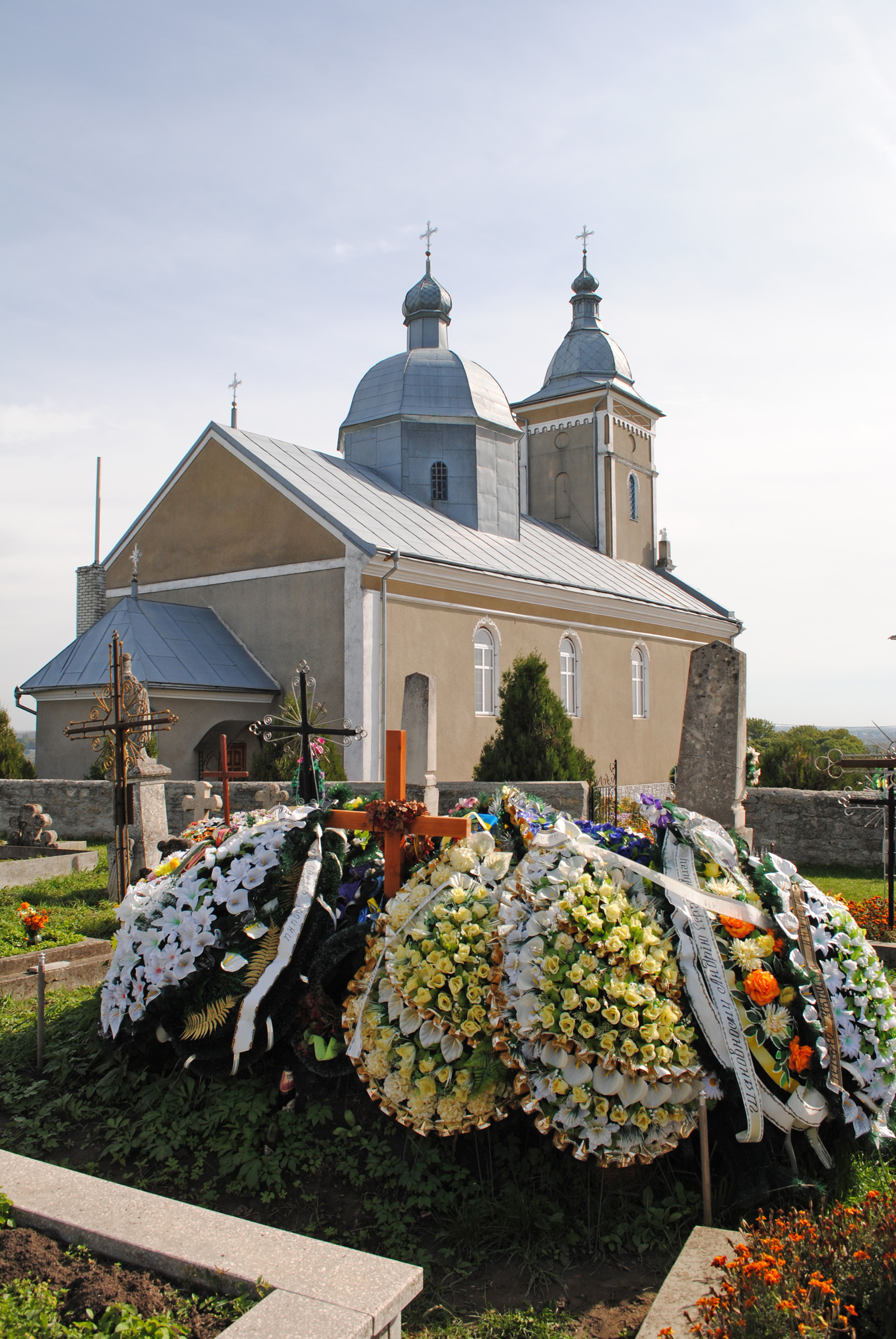 Могила рядового міліції (Міністерство внутрішніх справ України), бійця-гранатометника батальйону «Азов», уродженця с. Великий Глибочок Тернопільського району Тернопільської області Андрія Дрьоміна на цвинтарі в с. Великий Глибочок біля церкви Різдва Пресвятої Богородиці.